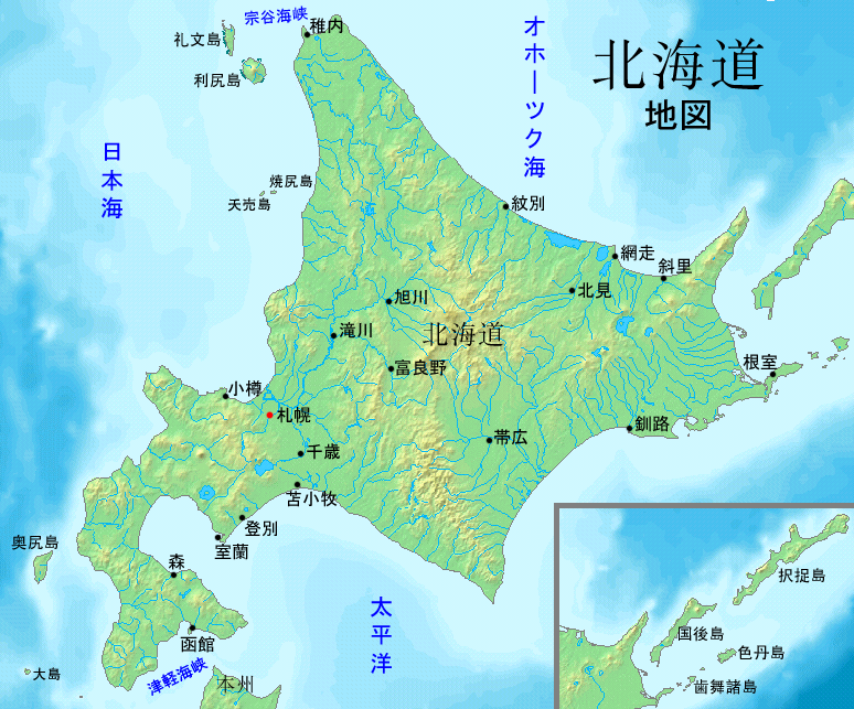 北海道地図（日本語で）。 関連項目: Image:Hokkaidomap-en.png